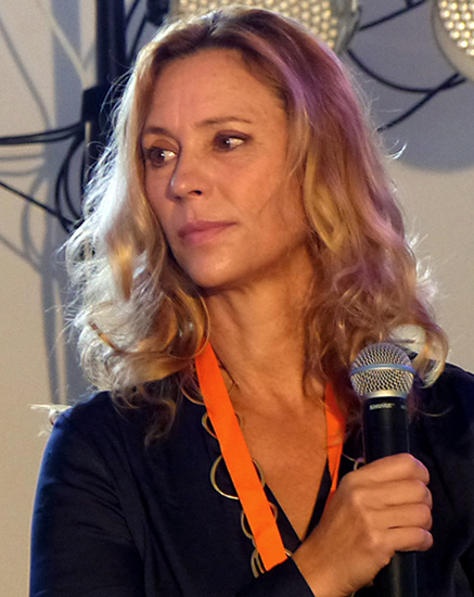 Schauspielerin Carin C. Tietze auf dem bumm Event/DVD-Release-Event von Mara und der Feuerbringer, München 2015.